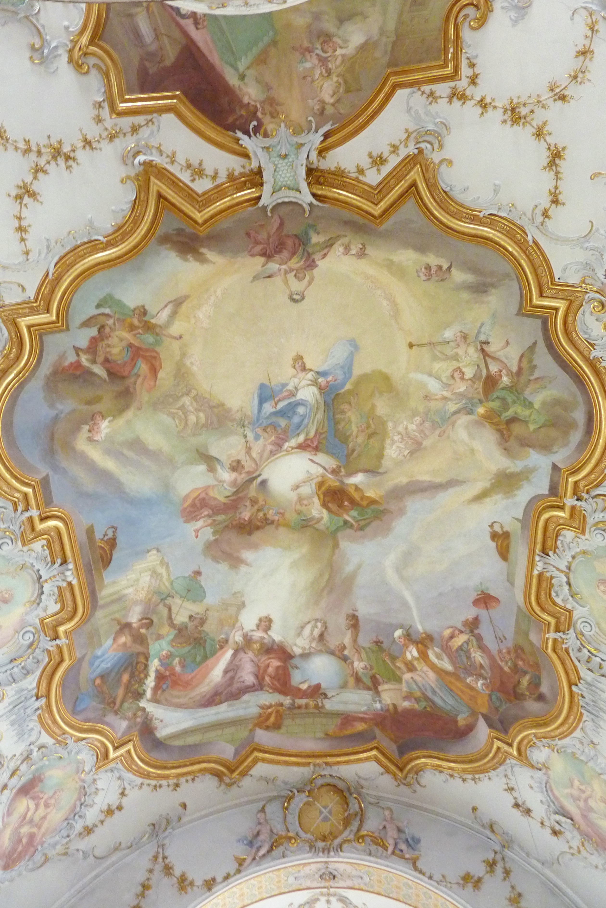 Katholische Wallfahrtskirche Mariä Himmelfahrt in Buggenhofen, einem Ortsteil von Bissingen im Landkreis Dillingen an der Donau (Bayern), Langhausfresko von Johann Baptist Enderle, von 1769, Stuck von Laurentin Hieber von 1768/69, Darstellung: Krönung Mariens, umgeben von den vier Erdteilen